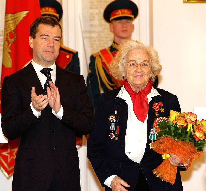 Дмитрий Медведев и Надежда Попова